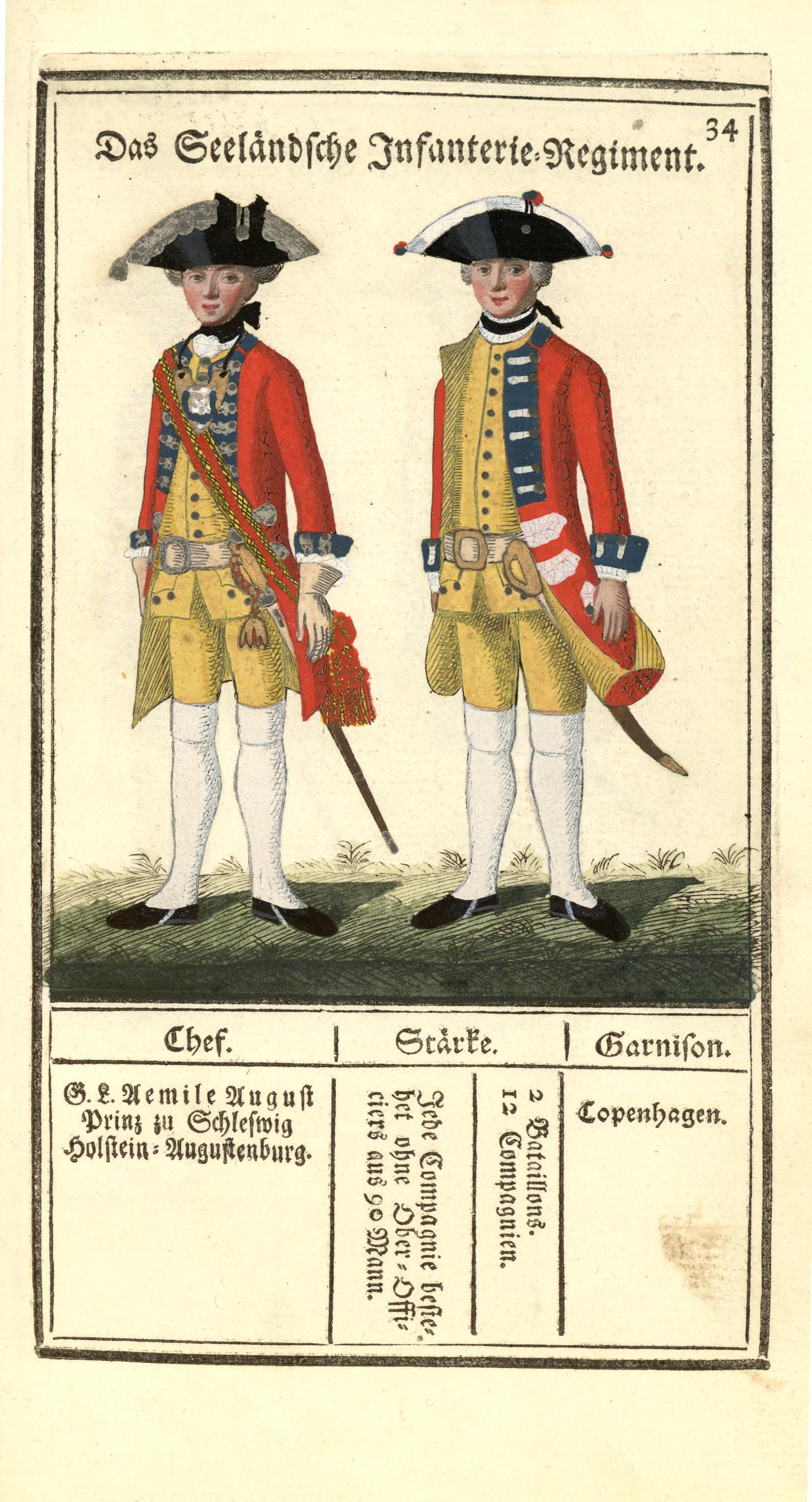 Illustrasjon hentet fra boken "Vorstellung der sämtlichen Königl. Dänischen Armee" av Bertram, Carl og utgitt av Carl Bertram (dk, 1763)